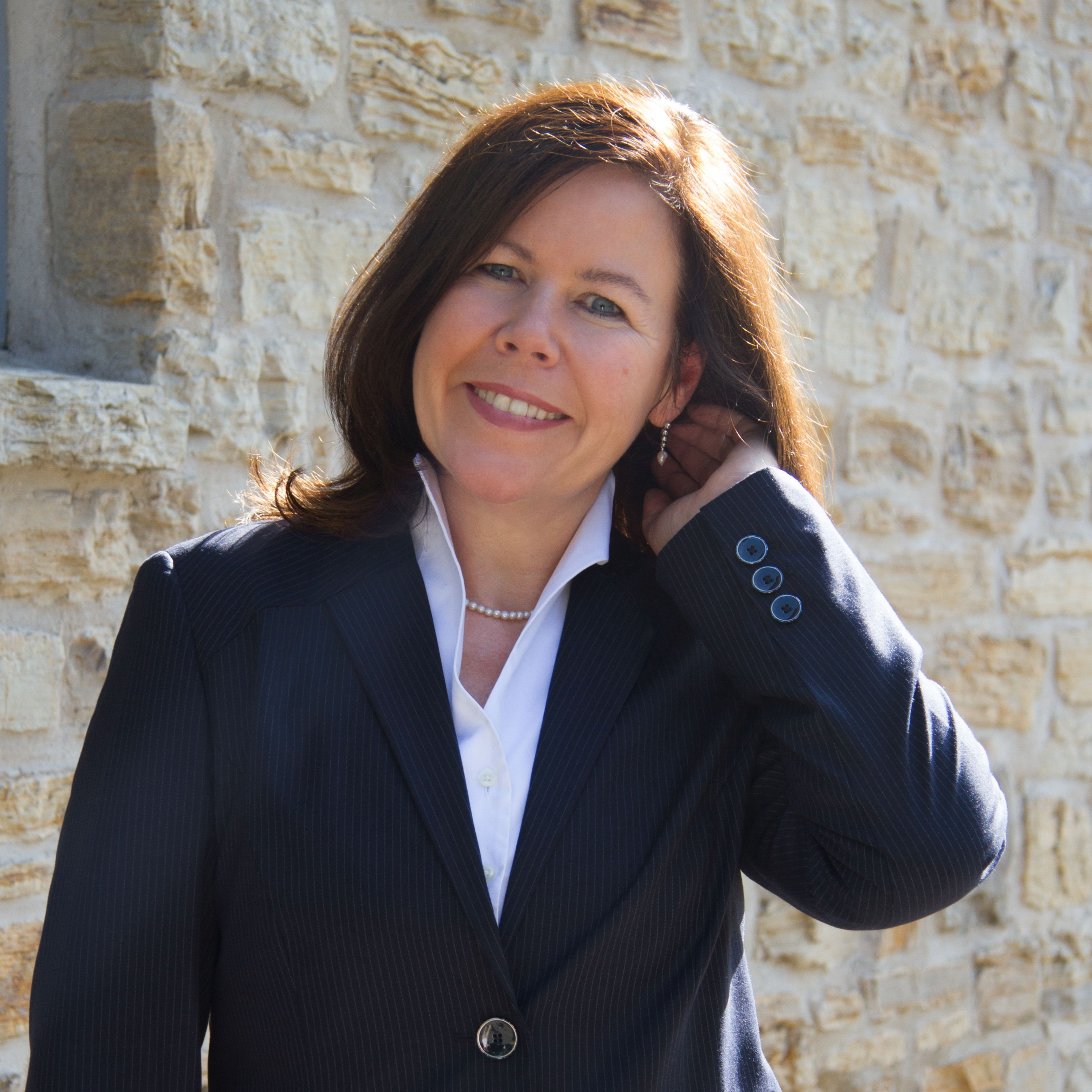 Das Bild zeigt den Vorstand der Stiftung Zentrale Stelle Verpackungsregister Gunda Rachut